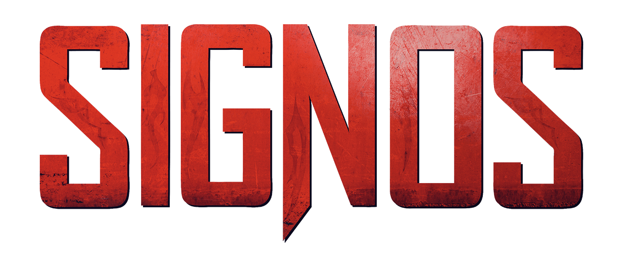 Logo de Signos, de El Trece y TNT